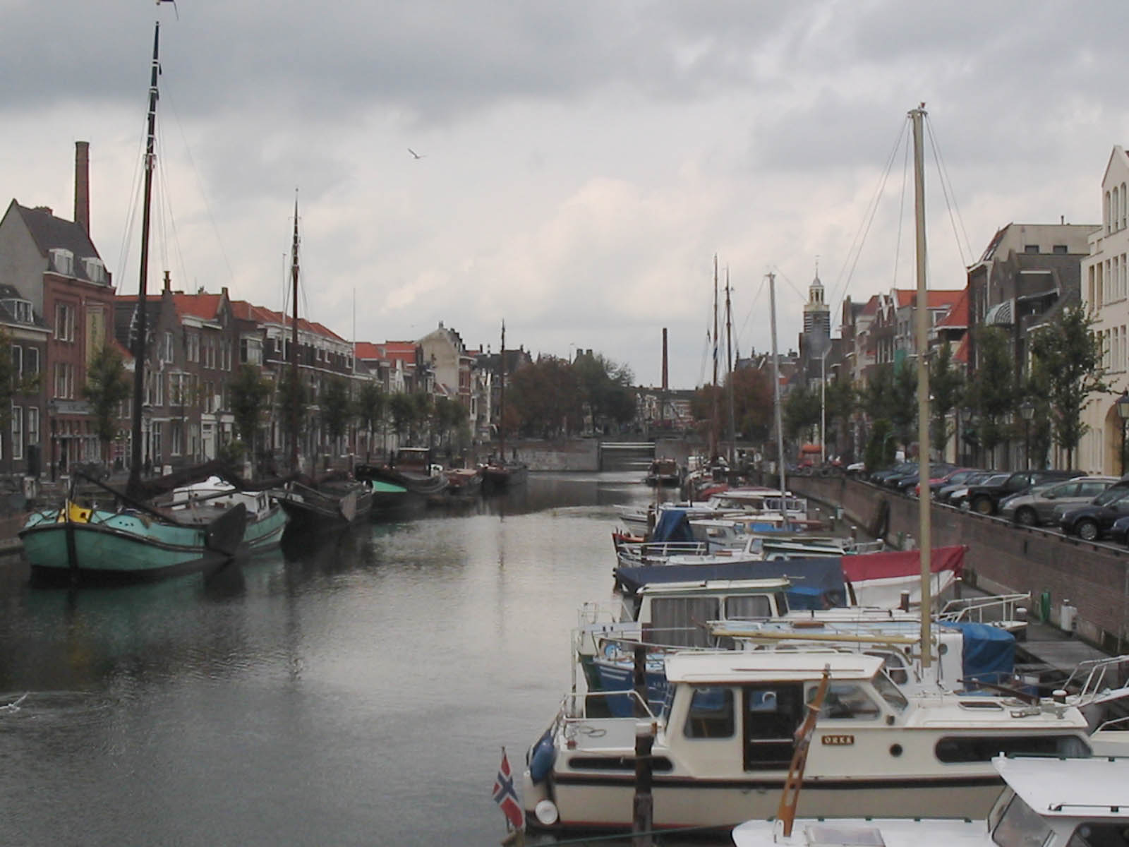 Delfshaven, Rotterdam, foto 23 oktober 2005